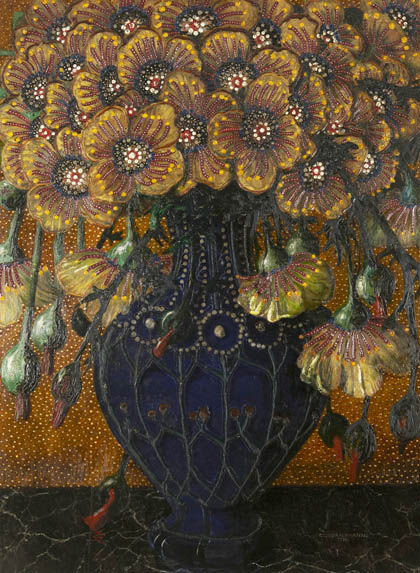 Blumenstilleben